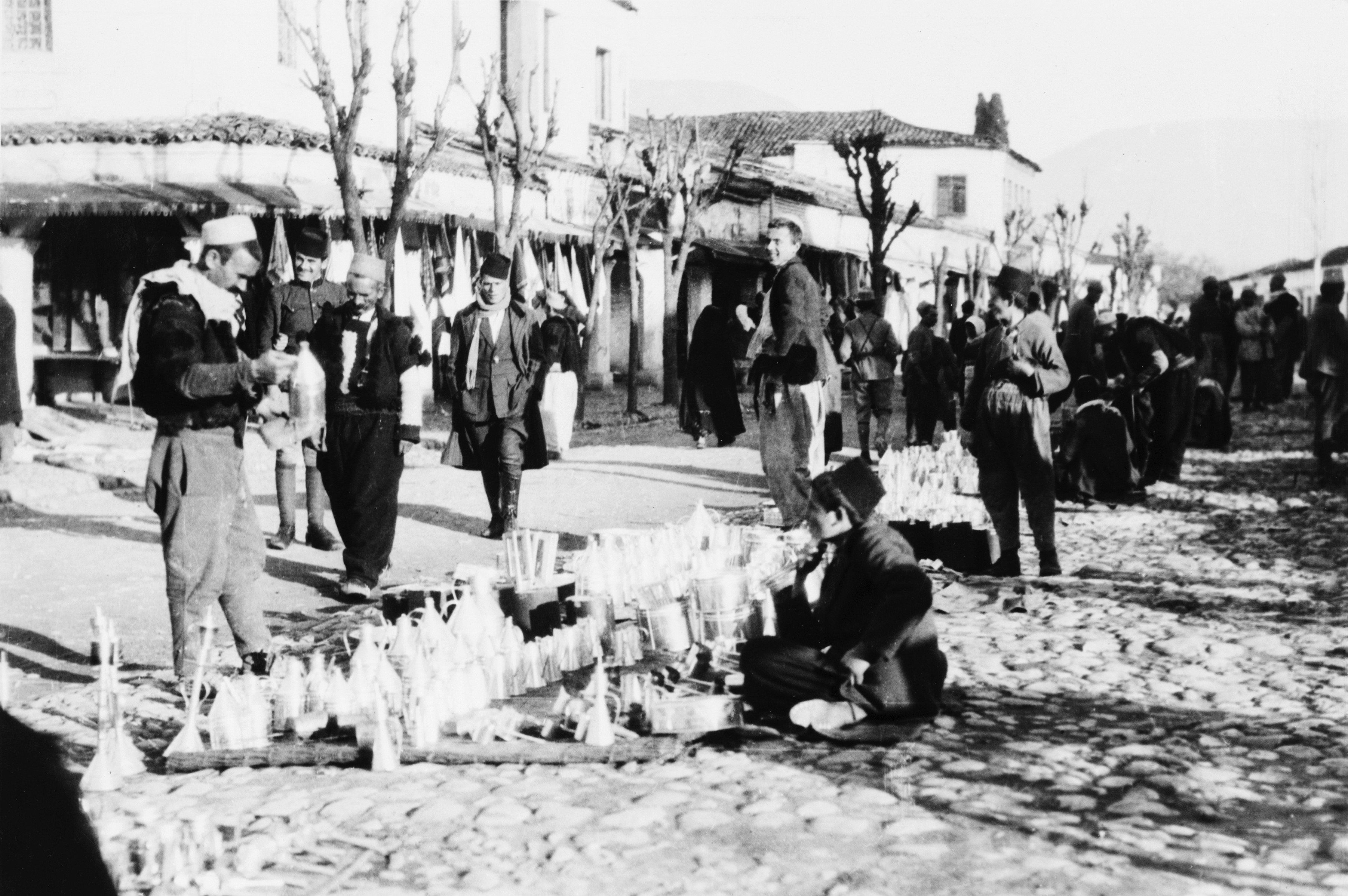 Bazar im Zentrum von Tirana. Der Händler verkauf Blechgeschirr wie Trichter und Töpfe.